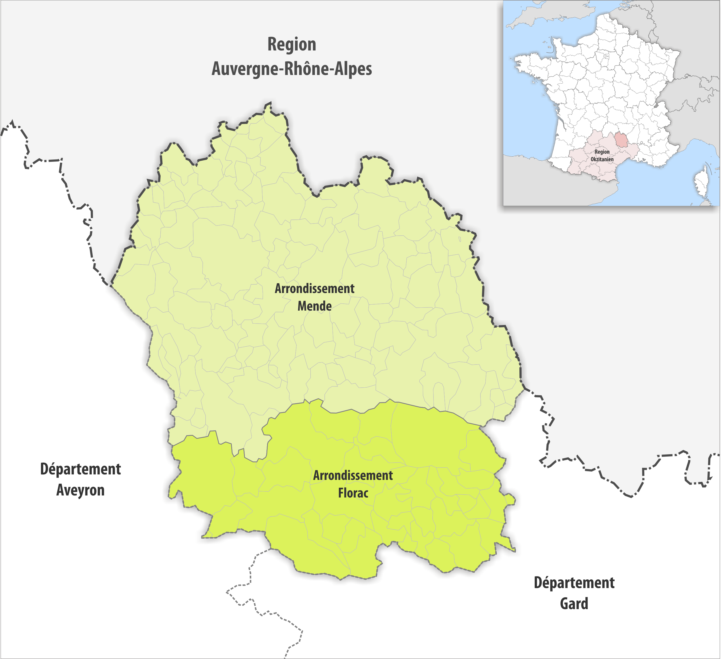 Gemeinden und Arrondissemente im Departement Lozère